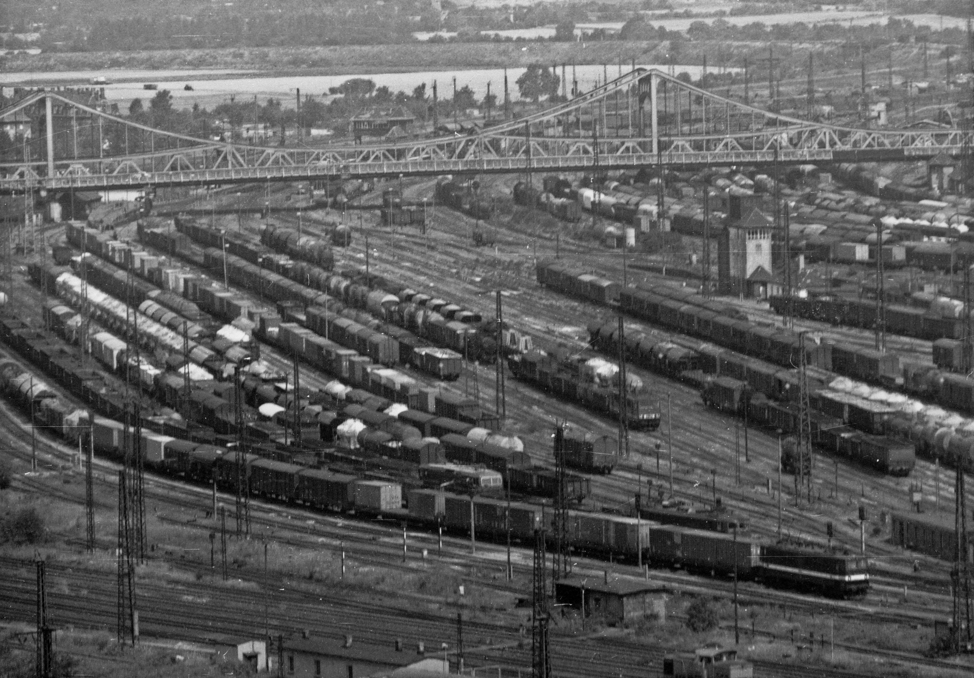 Blick auf den Güterbahnhof Halle Saale, im Hintergrund die alte Berliner Brücke, fotoscan, Kleinbild Telefoto 200 mm, vom Hochhaus am ehem. Thälmannplatz